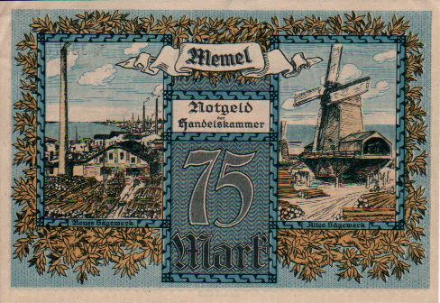 Memelland 75 mark 1922